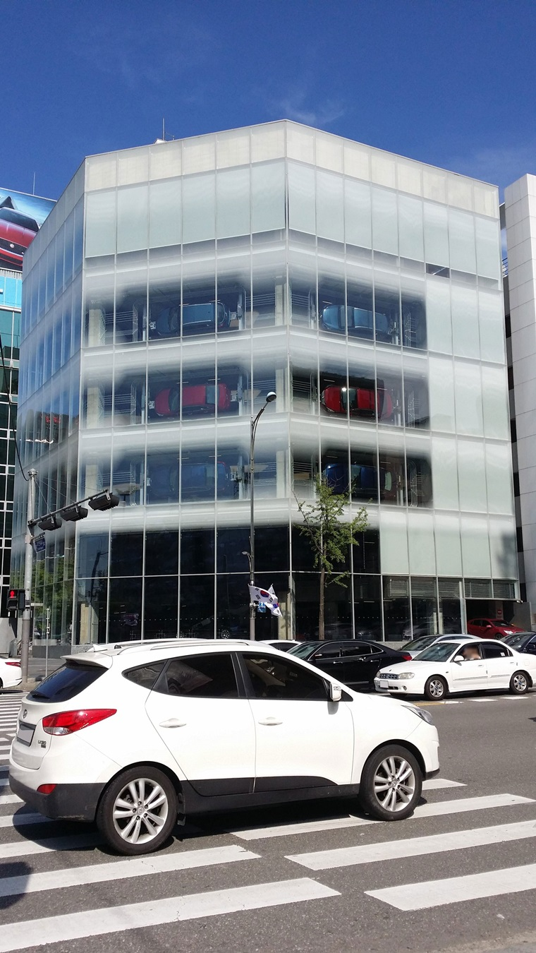 Hyundai Motor Studio Seoul